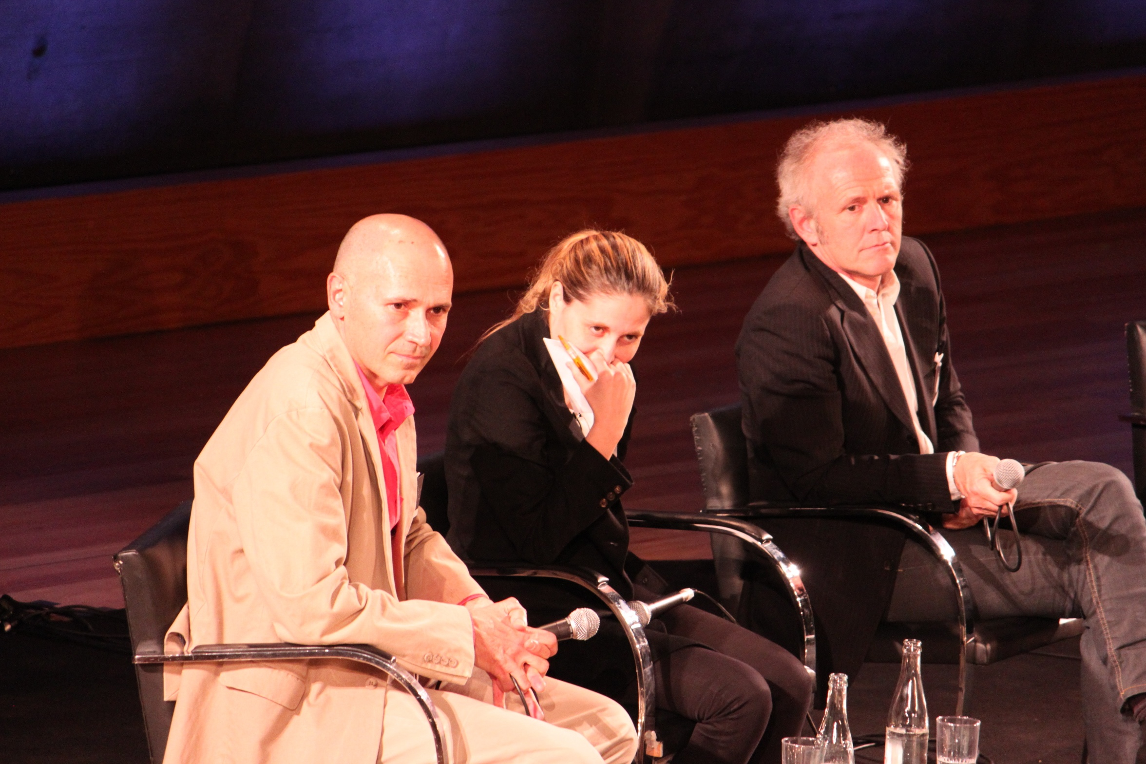 Christophe André, Cynthia Fleury et Arnaud de Saint Simon à l'Université de la Terre, à Paris, le 2 avril 2011.